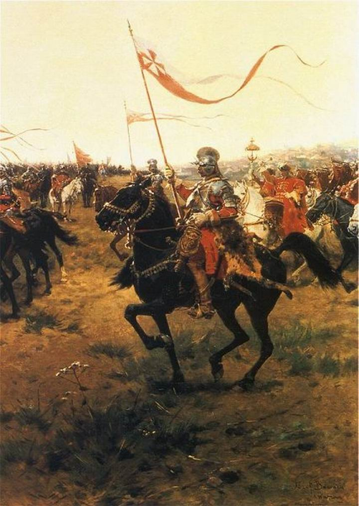 Lengyel ulánus